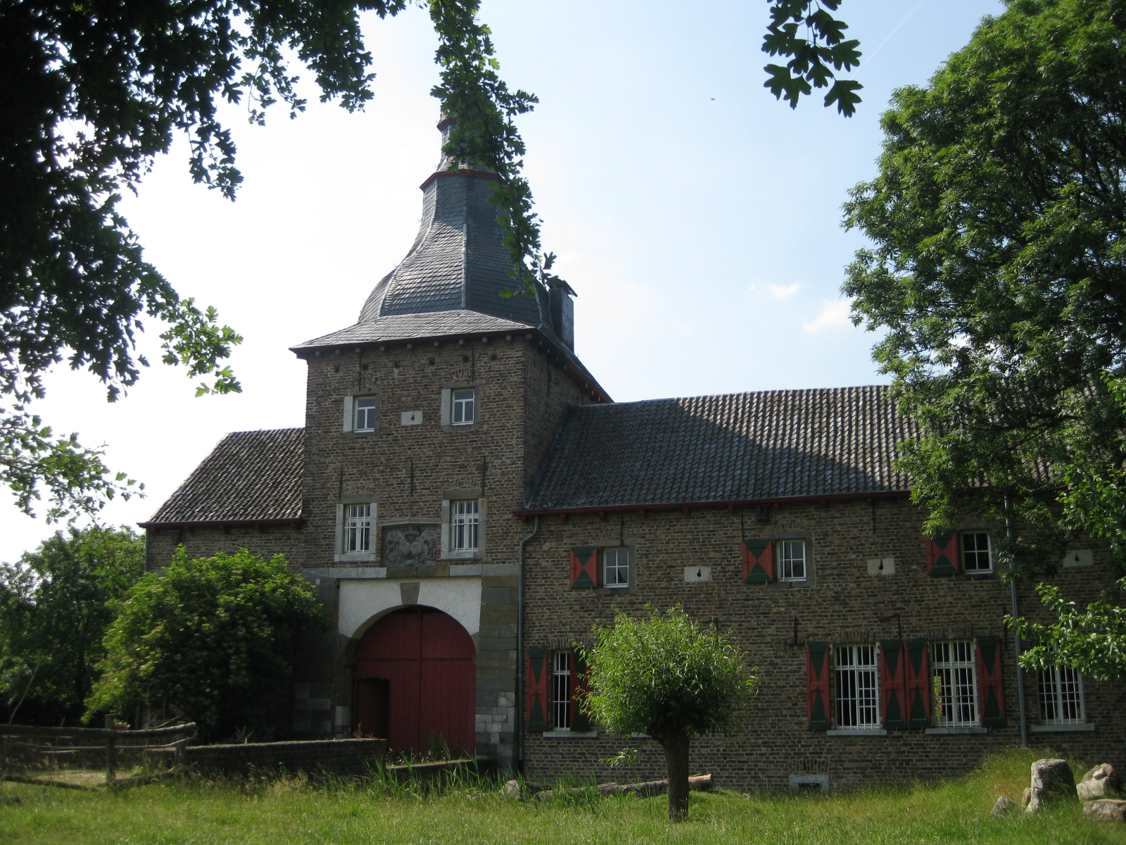 Das Rittergut Hausen nach dem Wiederaufbau in Aachen-Brand